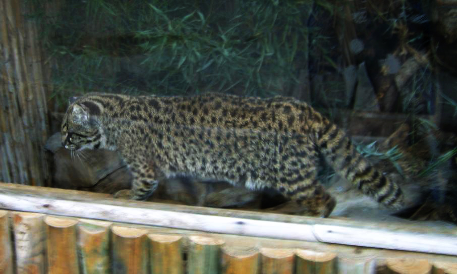 Kodkod (Oncifelis guigna)